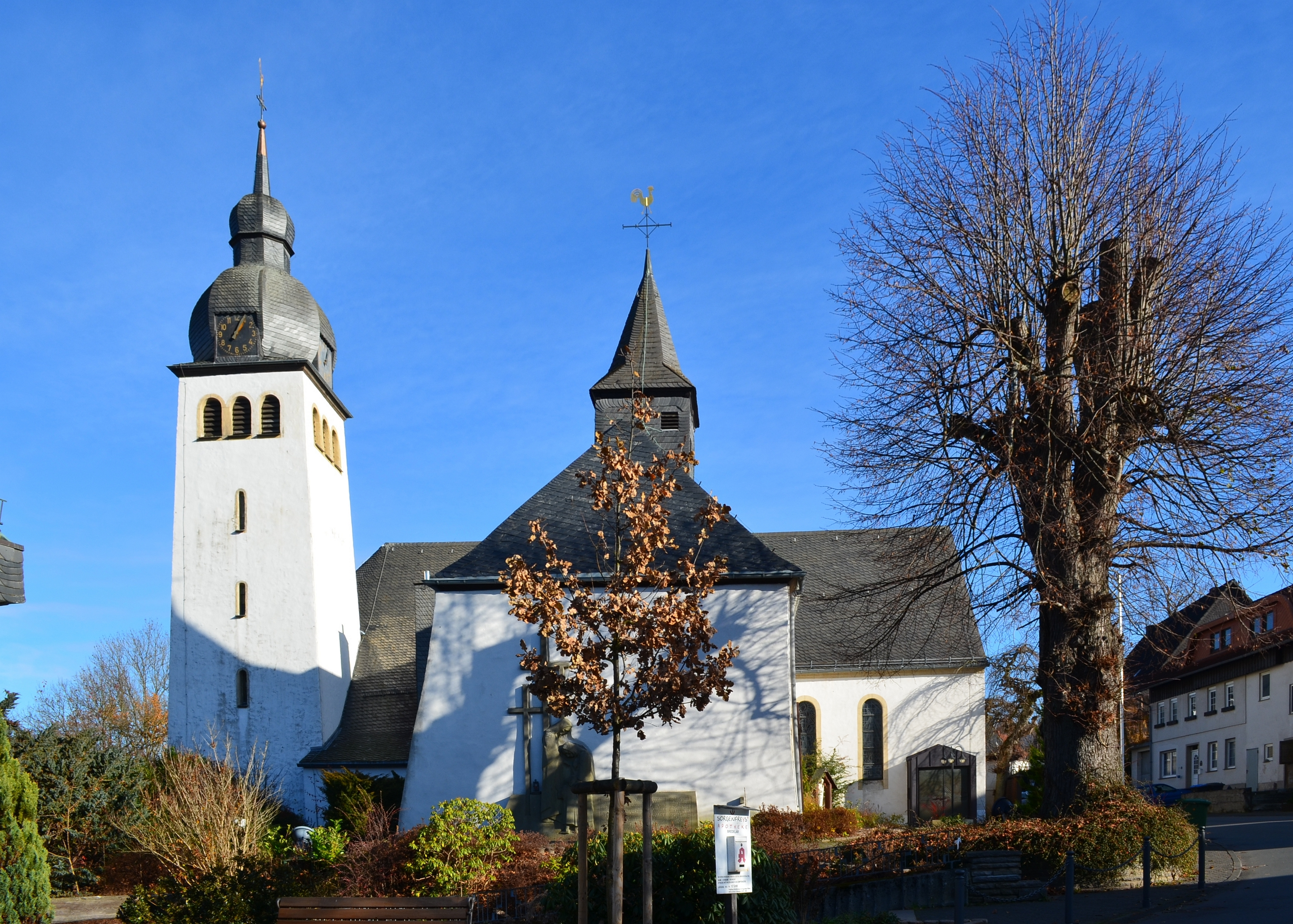 Brilon, Hoppecke, St. Mariä-Heimsuchung, Außenansicht